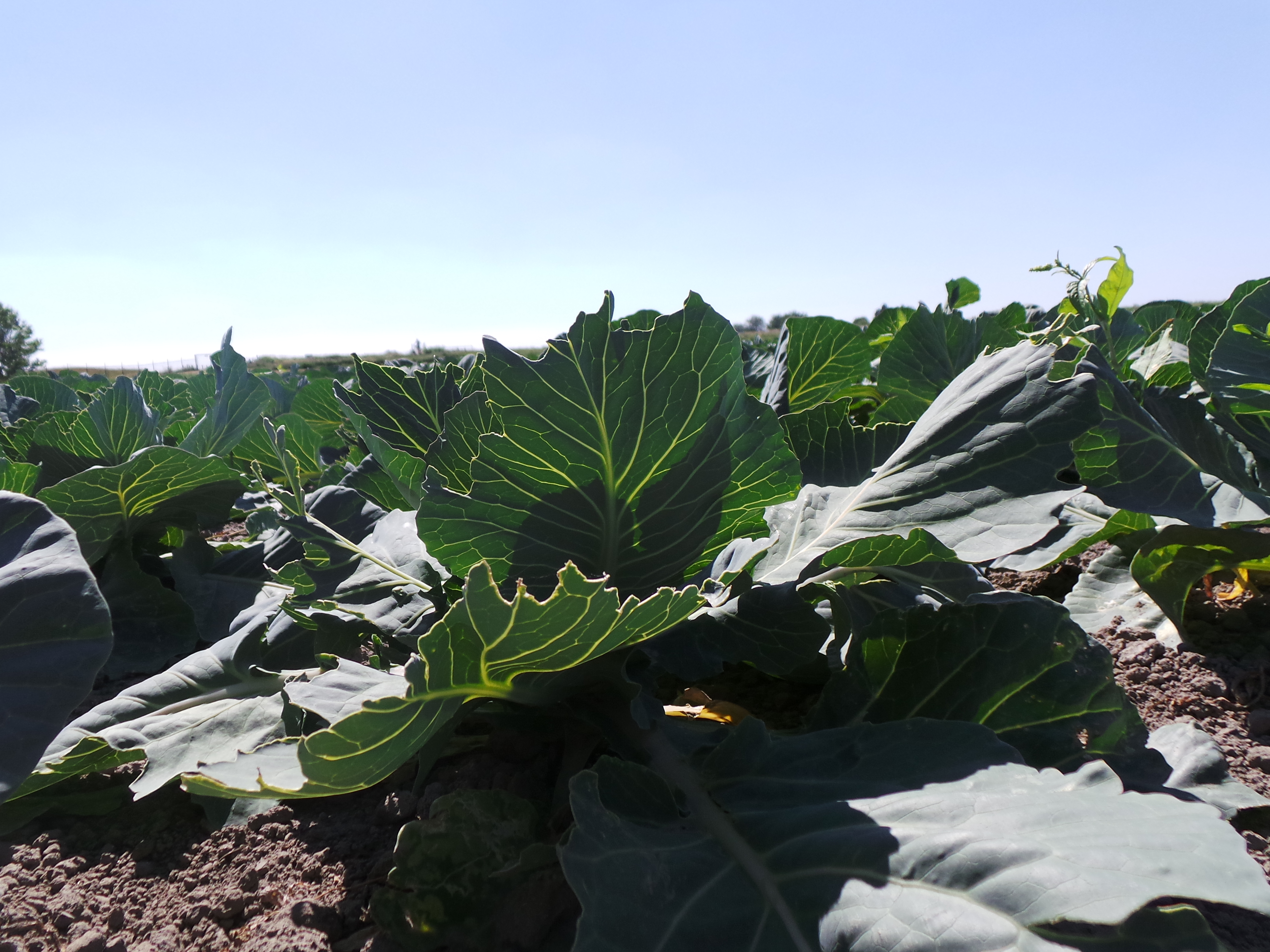 Een van de vele agrarische velden rondom Groenveld.